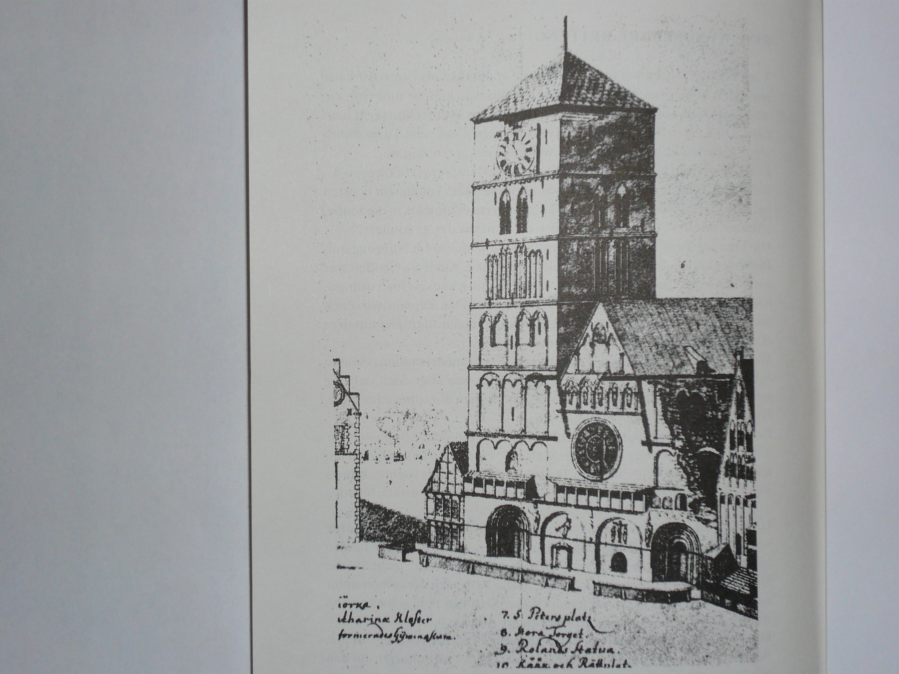 Stich eines schwedischen Zeichners vom Bremer Dom aus dem Jahre 1695.